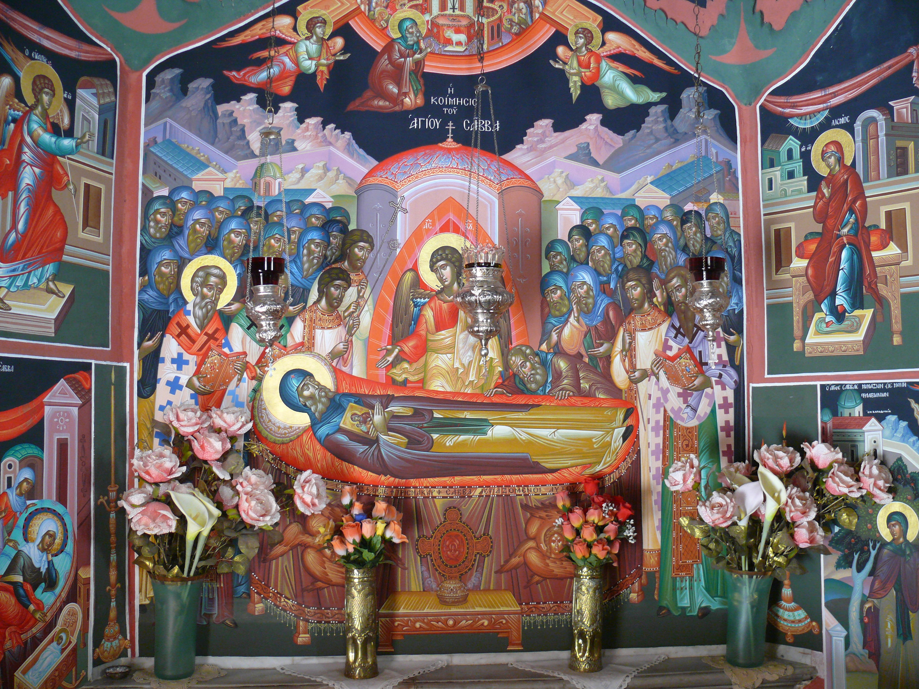 Mar Saba